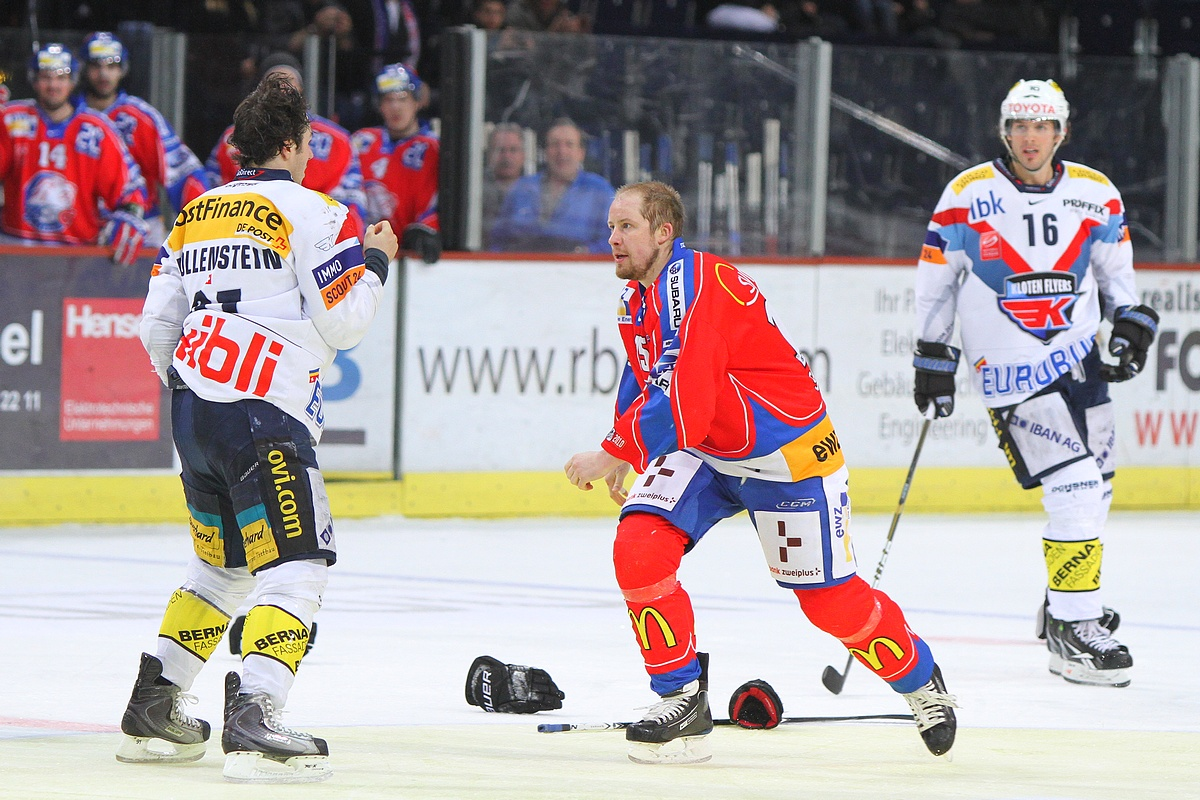 Denis Hollenstein, à gauche et de dos, joueur des Kloten Flyers se prépare à se bagarrer contre Matthias Seger, au centre, des ZSC Lions; tout cela sous le regard de Mark Bell, joueur des Kloten Flyers